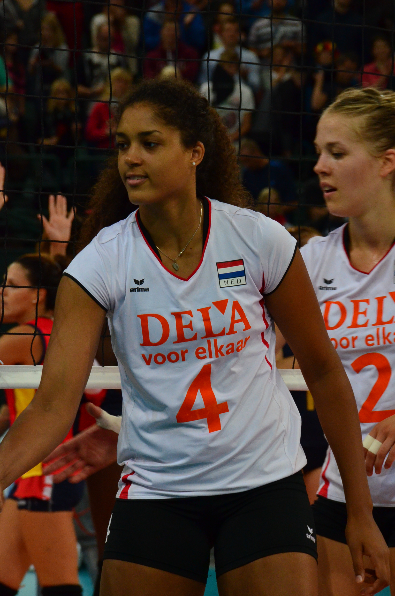 Volleyball-Europameisterschaft der Frauen 2013-Spielort Halle (Westf) Gerry-Weber-Stadion - Spiel 8. September 2013 (Spanien-Niederlande)